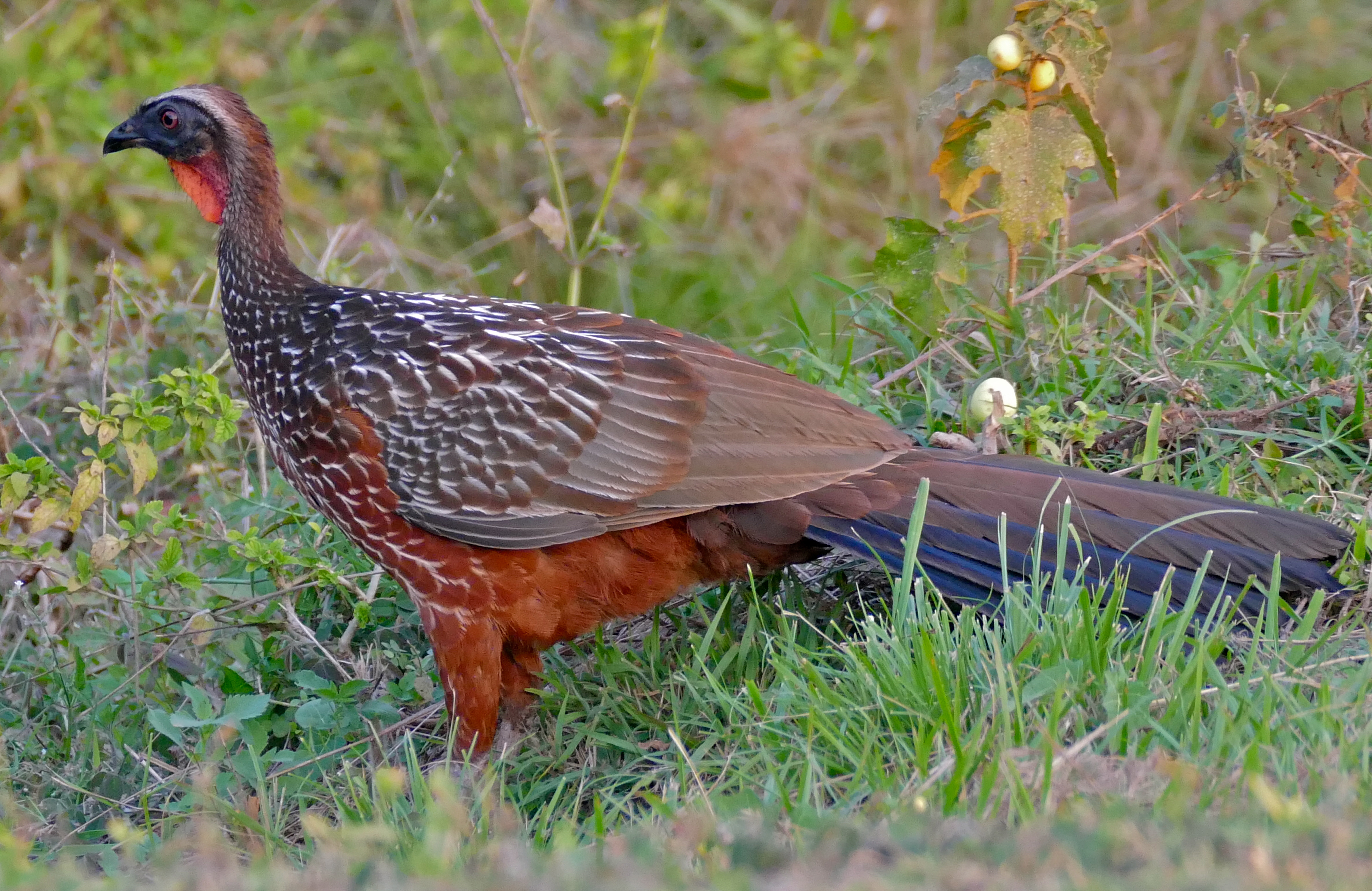 Transpantaneira, Poconé, Mato Grosso, BRAZIL